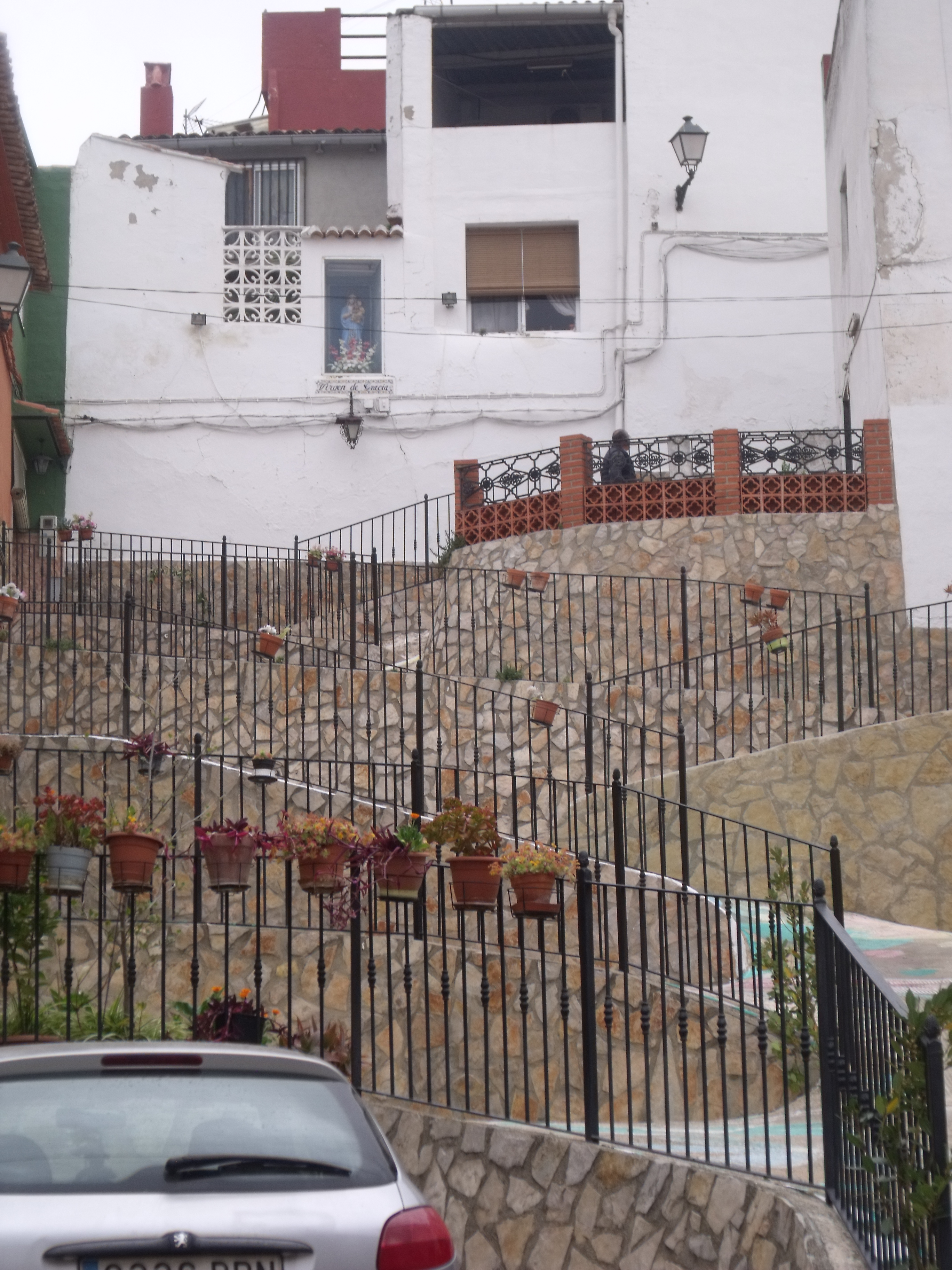 Escalinata en la calle de la Iglesia Vieja